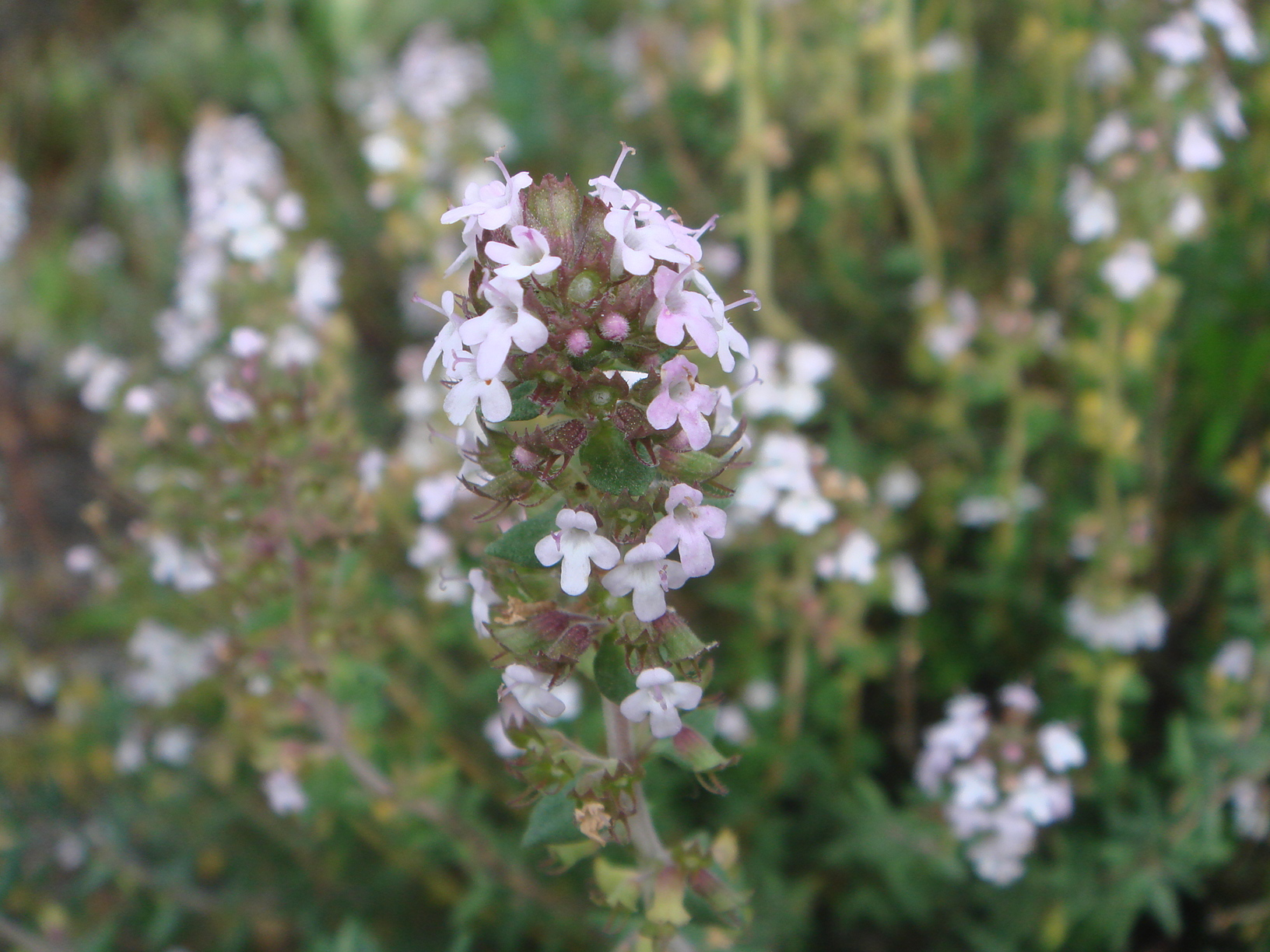 Thymus maroccanus, Ceuta , España.